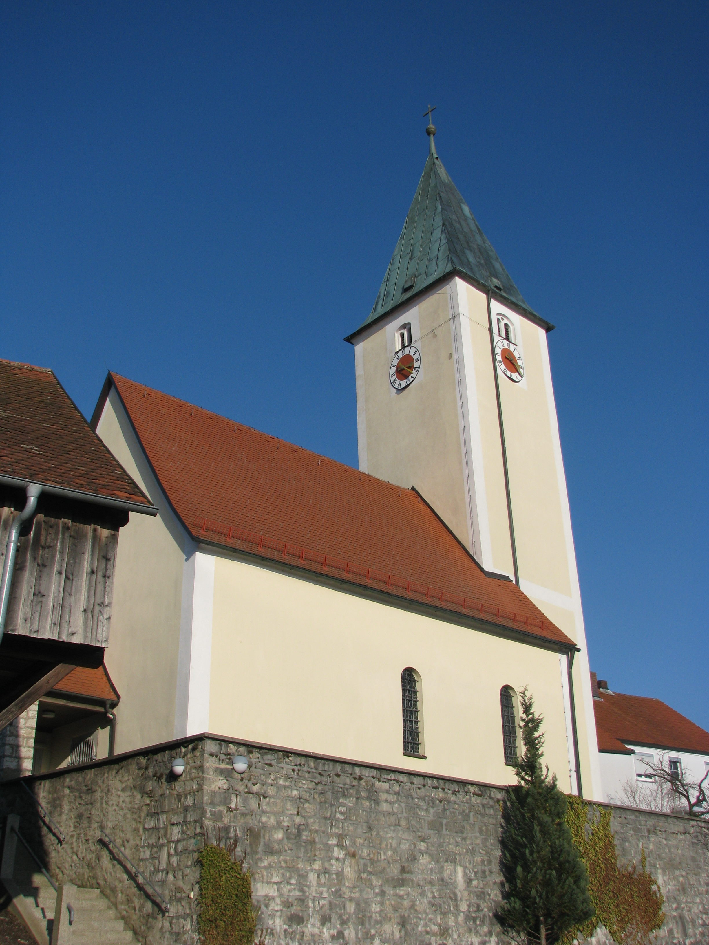 Mittersthal, Ortsteil von Deining im Landkreis Neumarkt in der Oberpfalz, Kath. Filialkirche St. Matthias